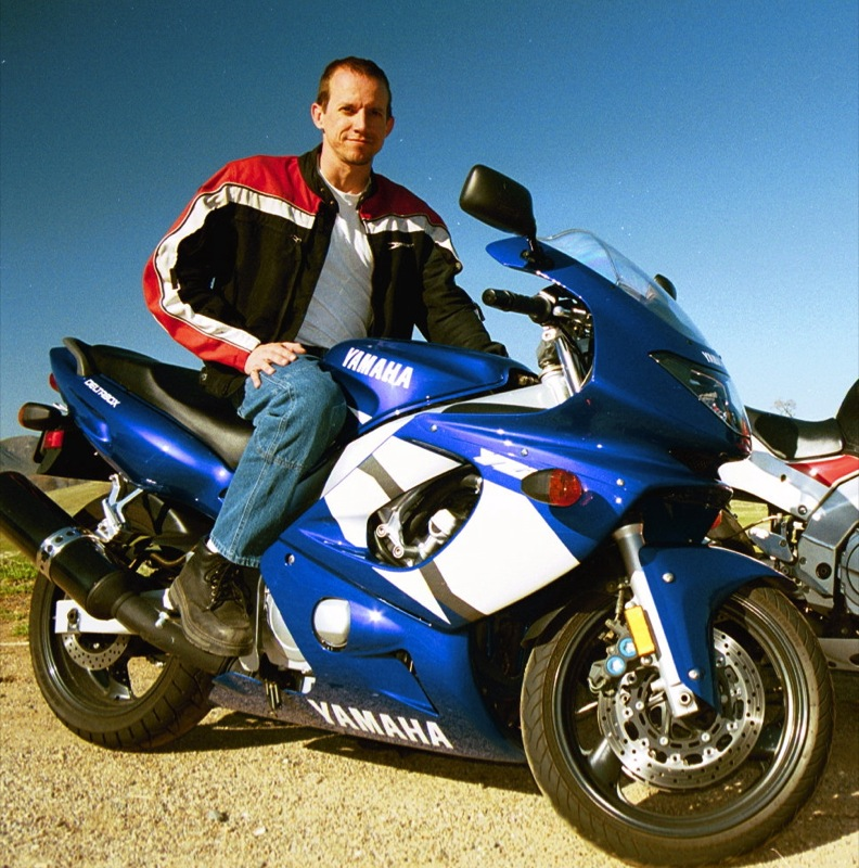 Yamaha YZF600R